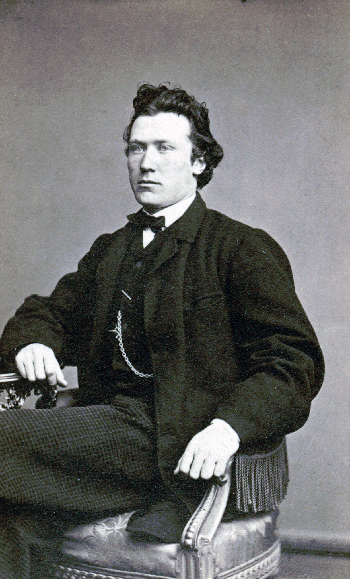 August Fredrik Dörum, Kungliga Dramatiska teatern 1865